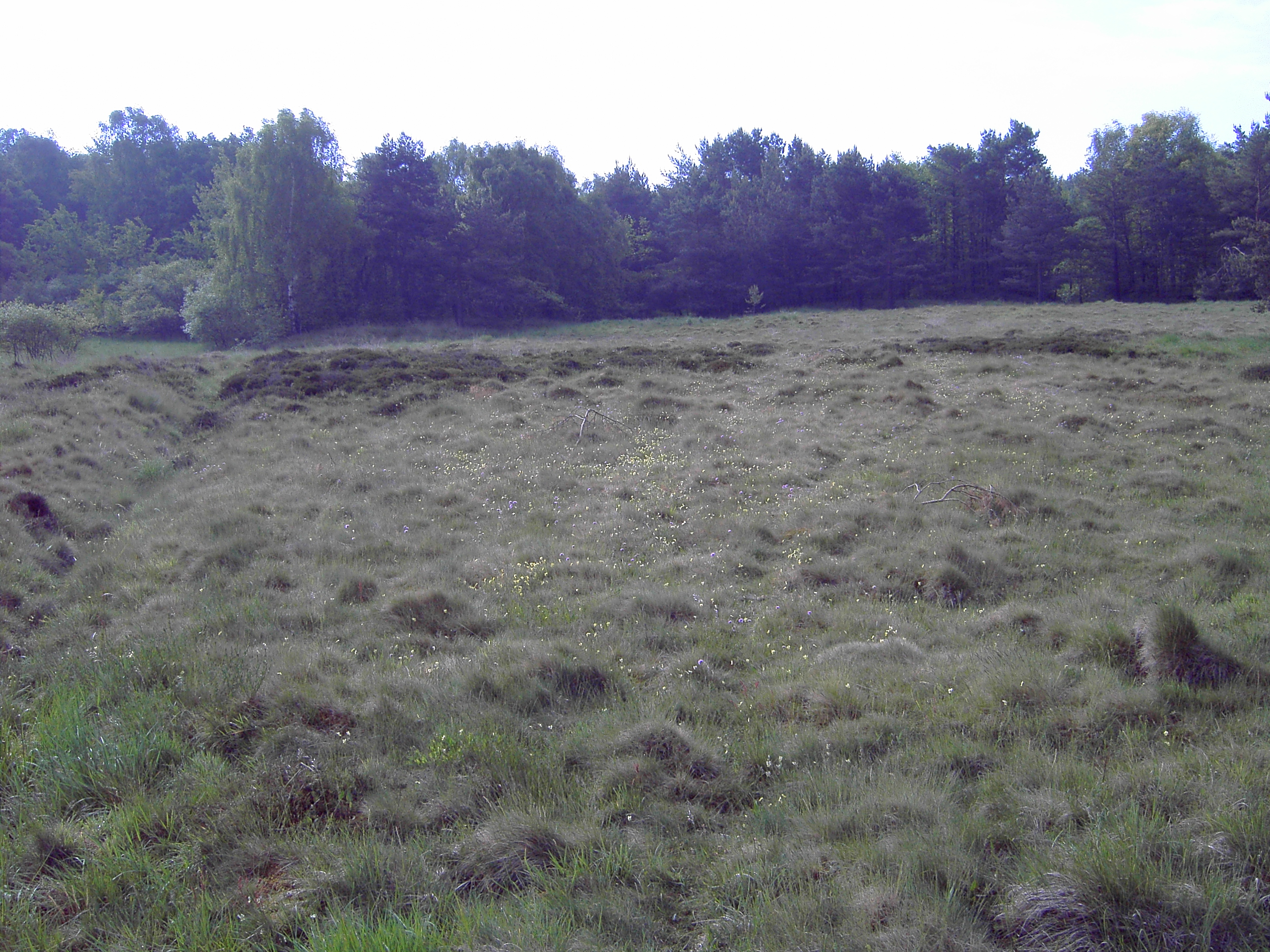 Heidelandschaft mit Galmeiflora am Napoleonsweg